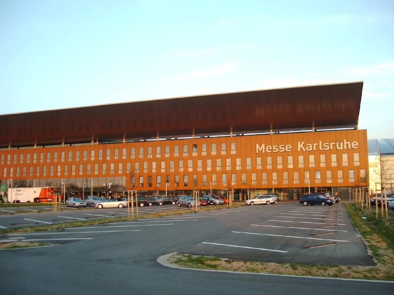 Neue Messe Karlsruhe (eigentlich Rheinstetten)